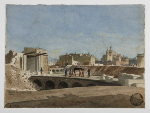 Dibuix de Francesc Soler i Rovirosa de la Ciutadella en el moment del seu enderroc l'any 1869